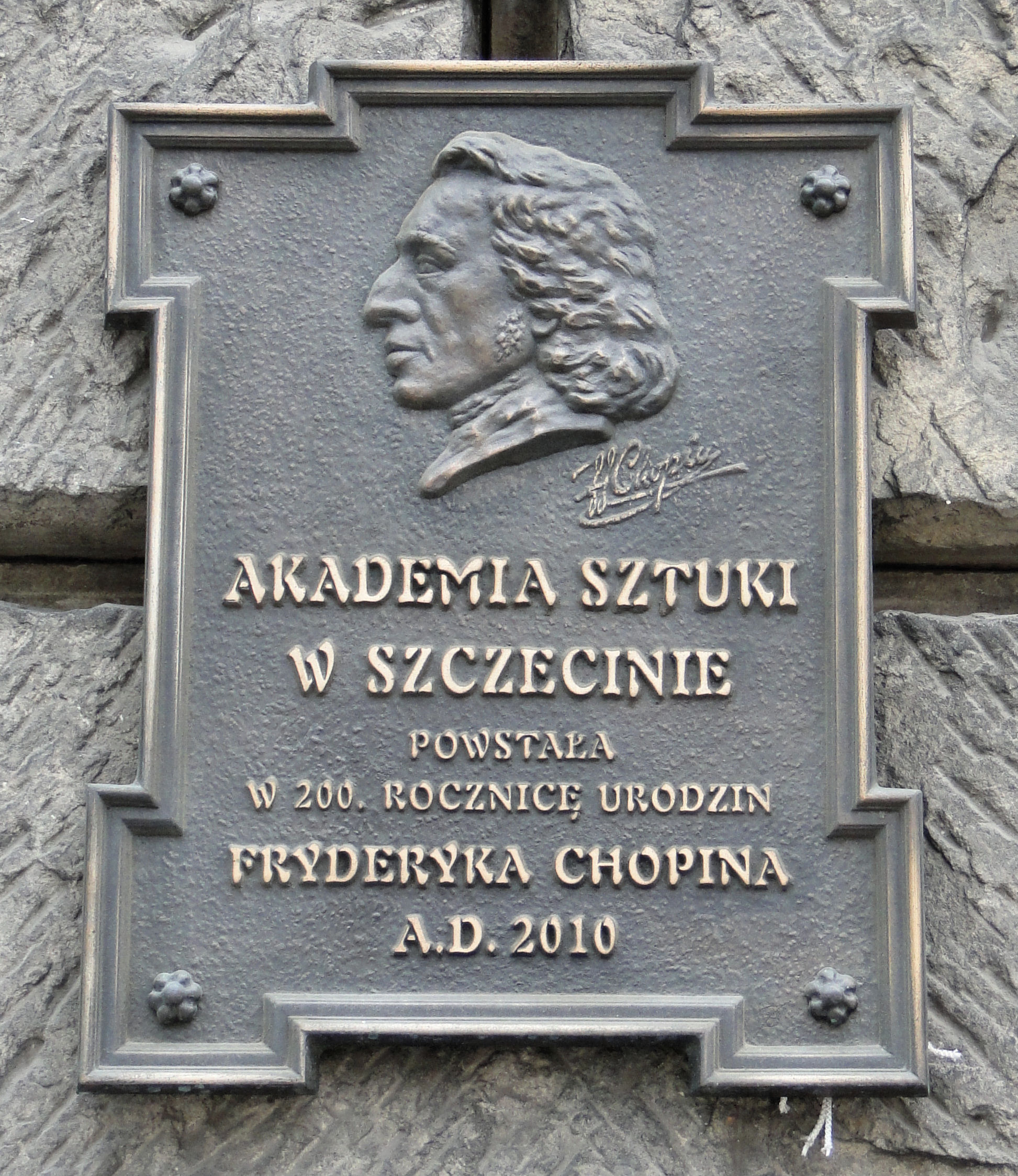 Szczecin Plac Orła Białego 2 - Pałac pod Globusem, aktualnie Akademia Sztuki, 1723